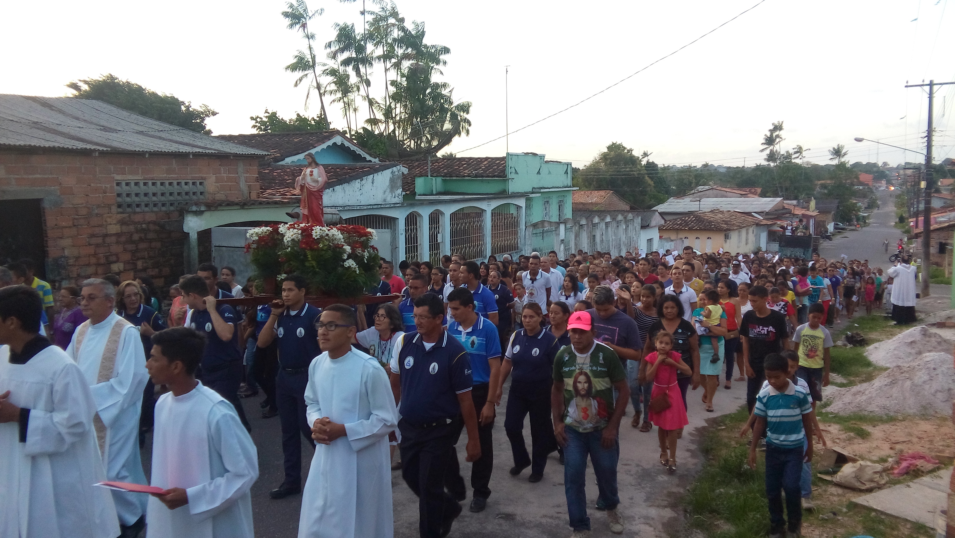 Procissão da Festividade do Sagrado Coração de Jesus